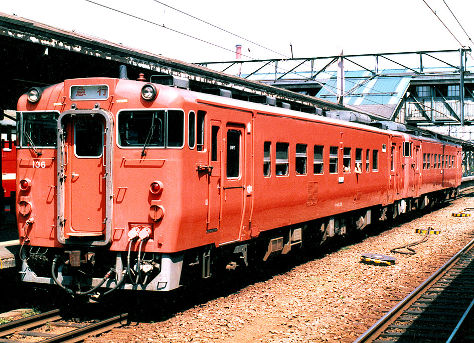 国鉄キハ40 136 急行「えりも」